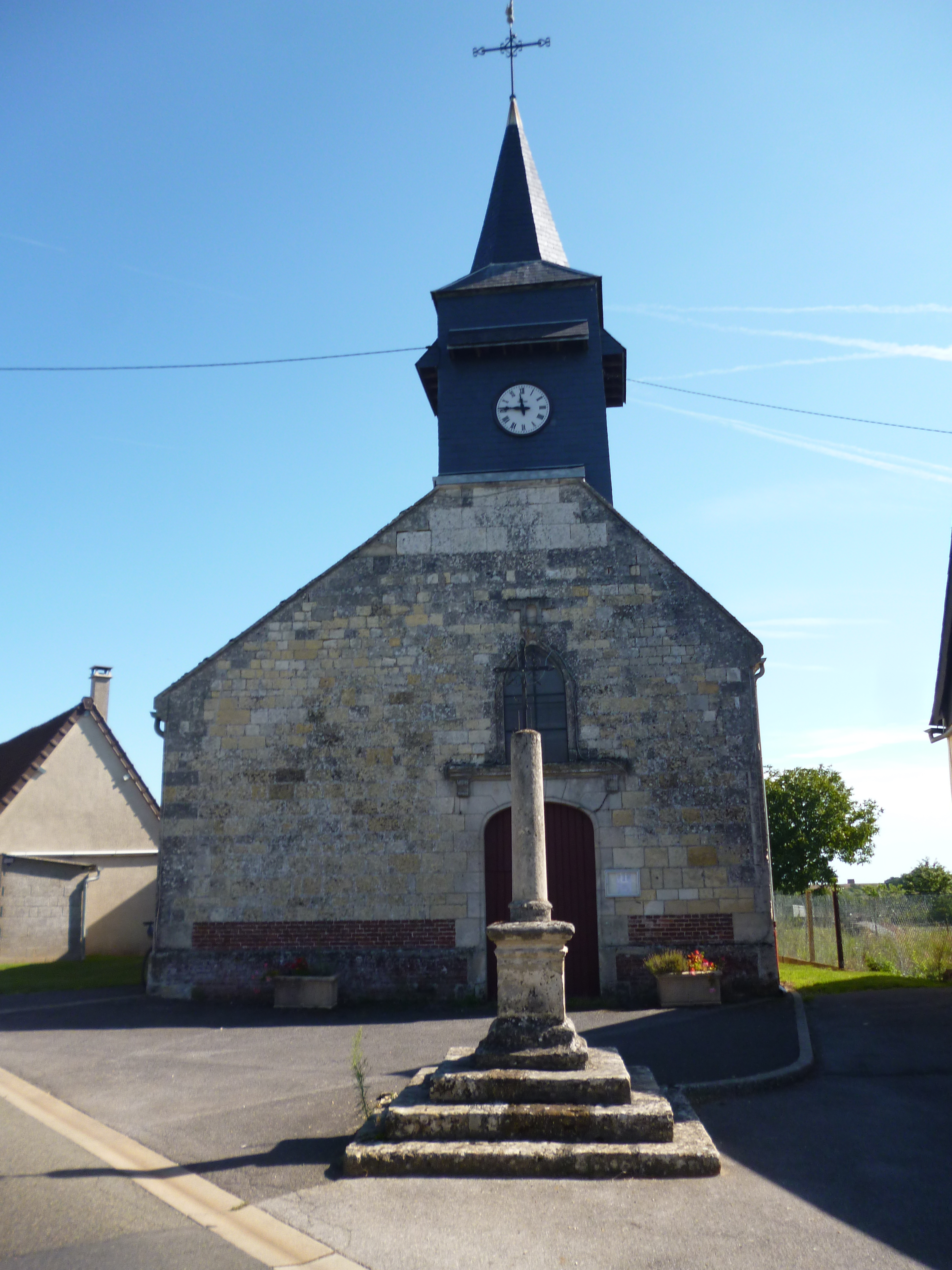 Calvaire et église Saint-Pierre de Crèvecœur-le-Petit (Oise).